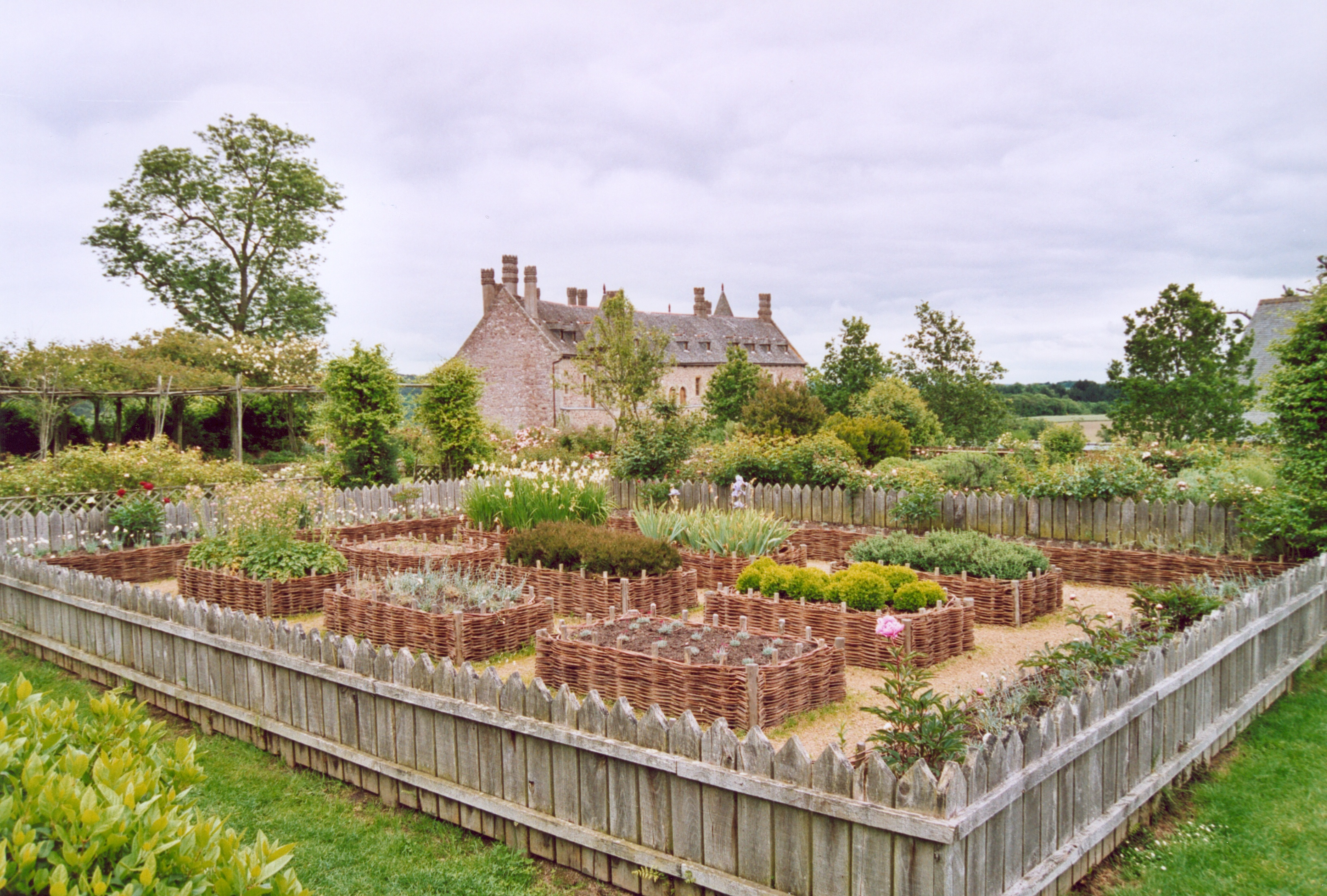 France Bretagne Côtes d'Armor Jardins du château de la Roche-Jagu Photographie prise par GIRAUD Patrick